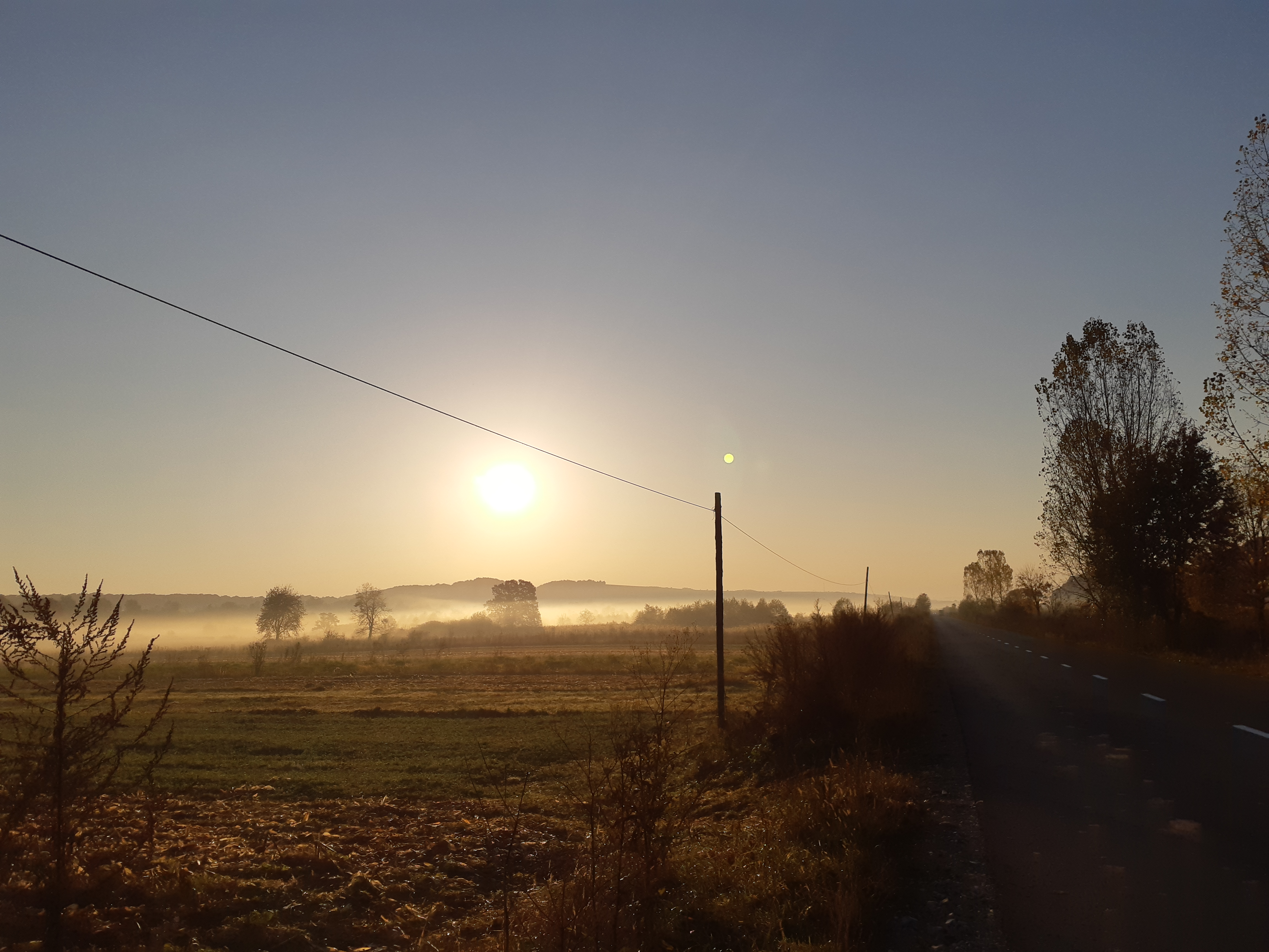 Imagine din depresiunea Tazlău-Caşin: între Tazlău şi Frumoasa